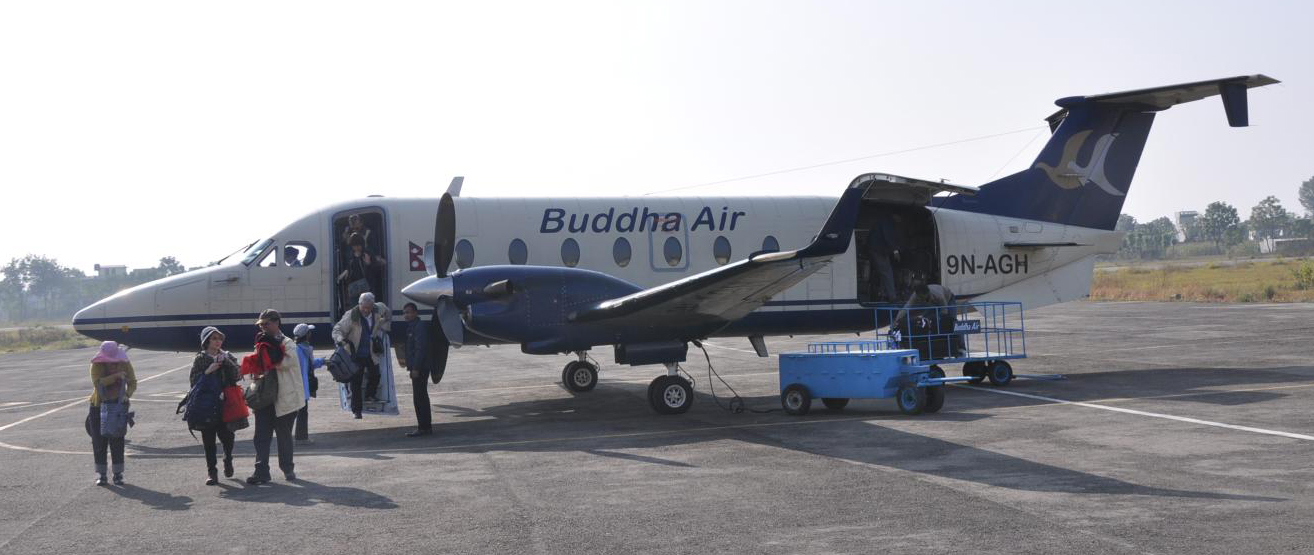 Buddha Air plane 9N-AGH